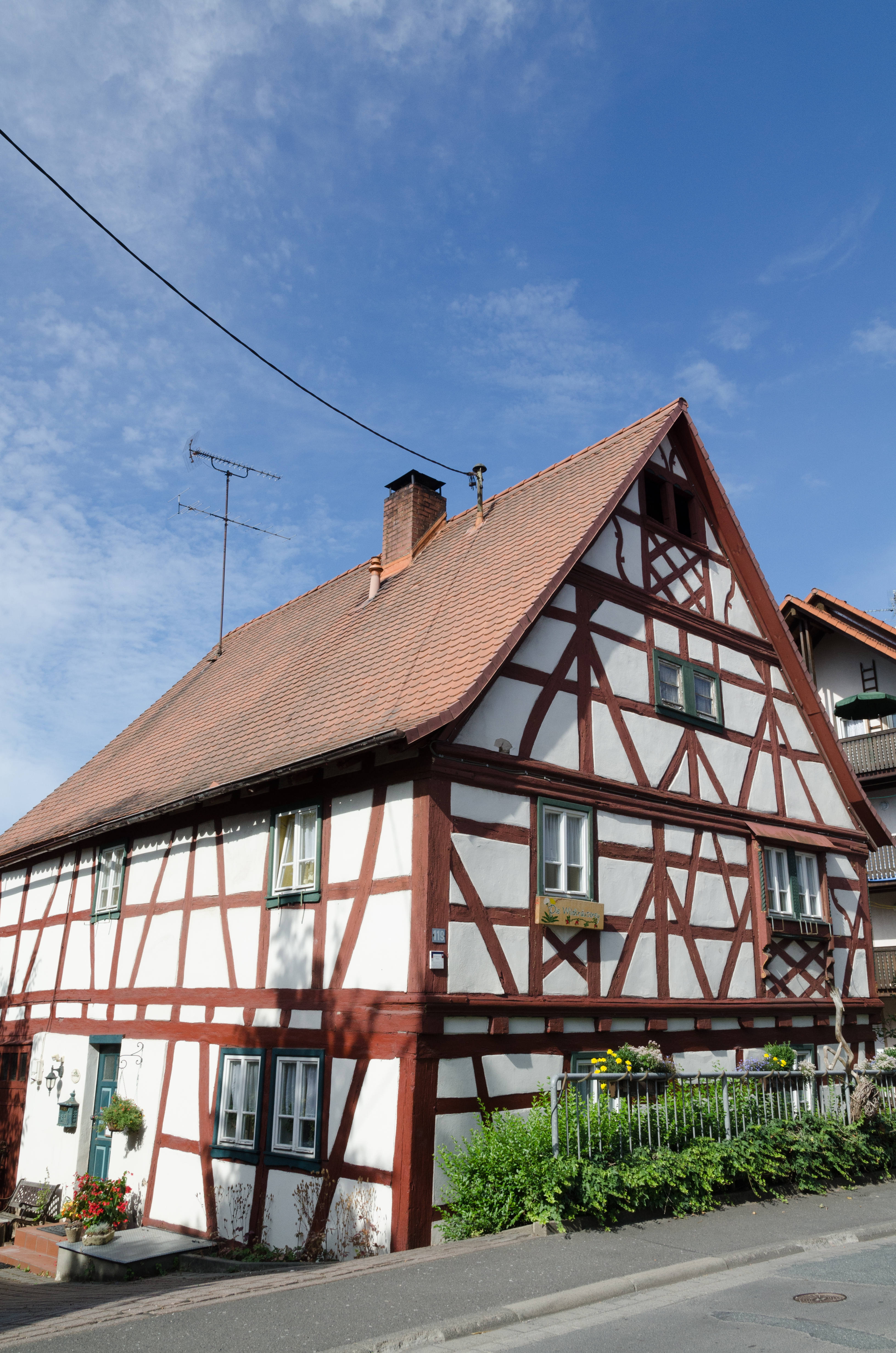 Waldaschaff, Aschaffenburger Straße 119